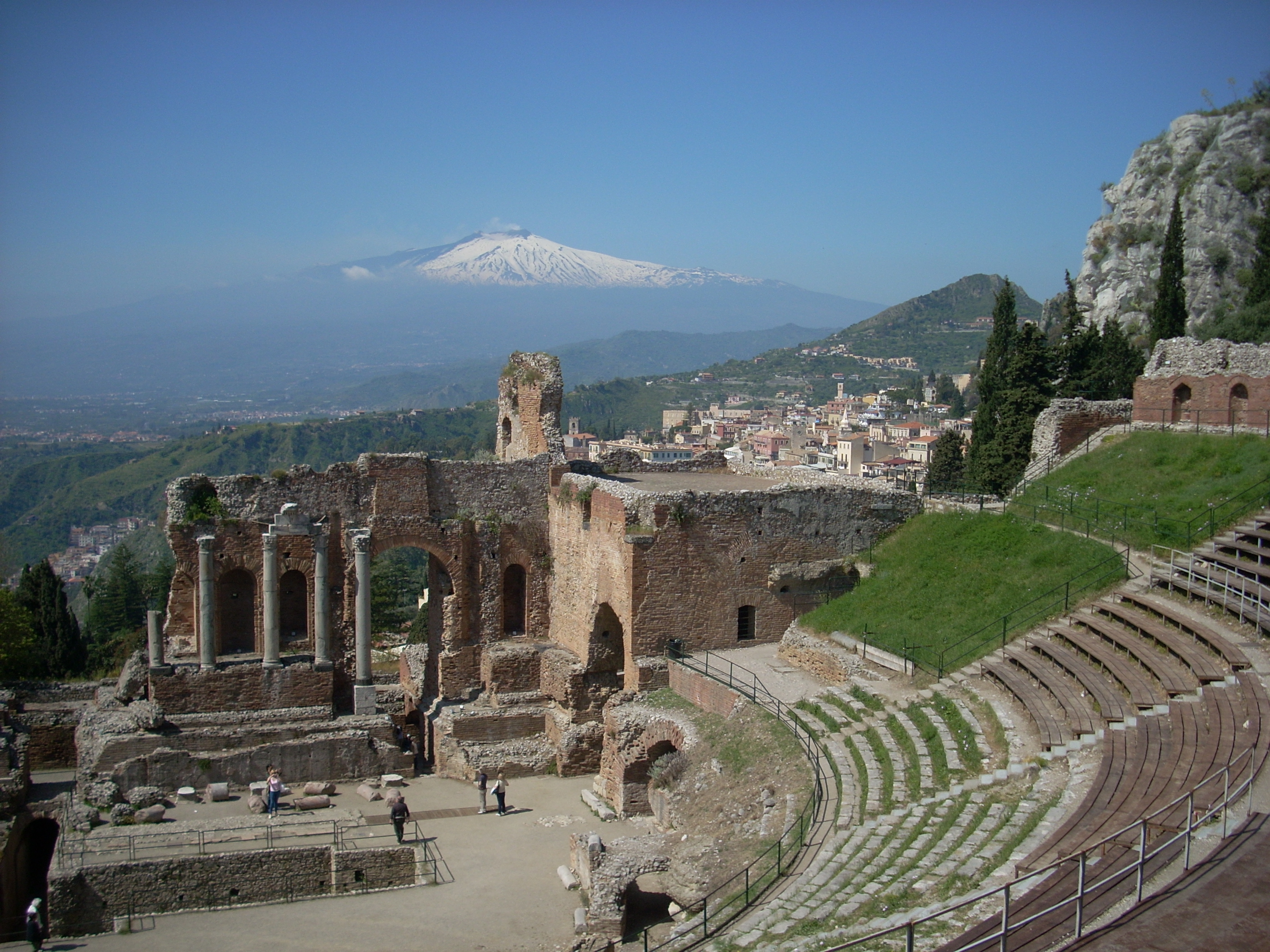 Gezicht op de Etna vanaf het Griekse theater in Taormina